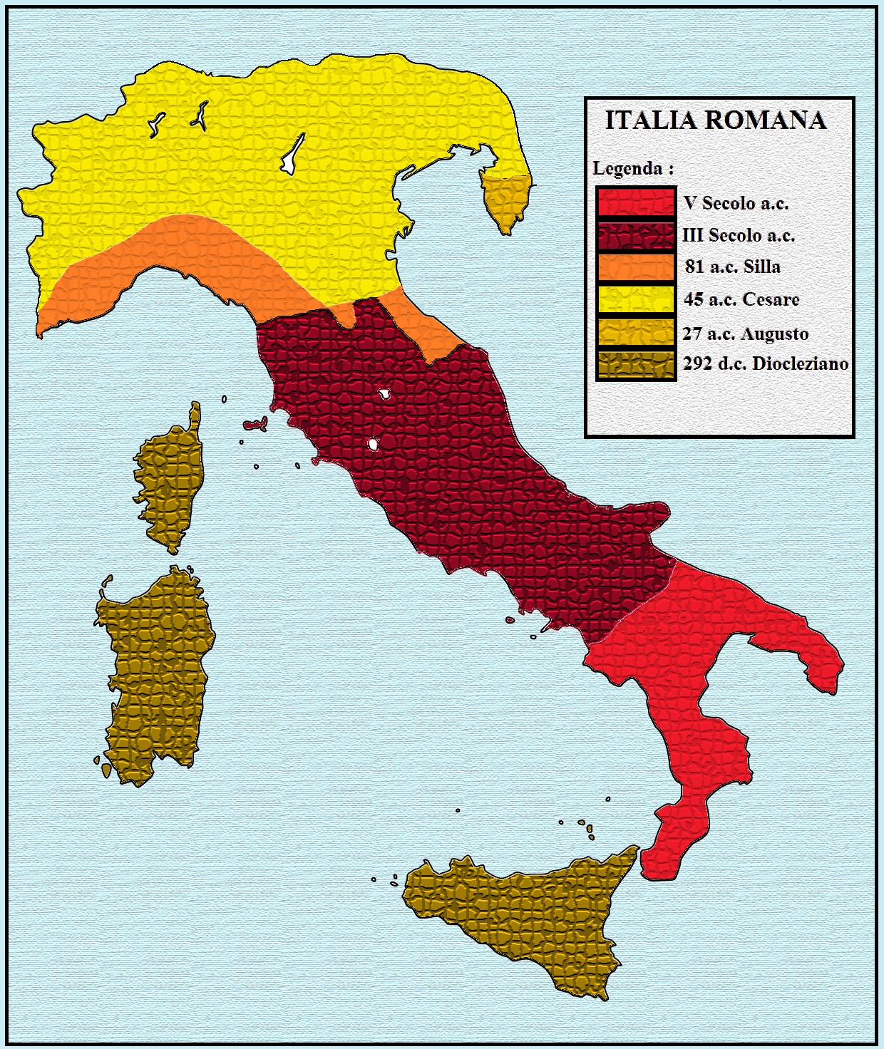 Evoluzione geografica dell'Italia nel periodo Romano [1]